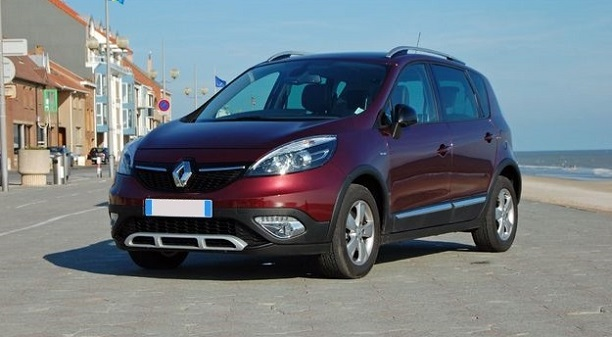 Renault Scenic 3 X-Mod